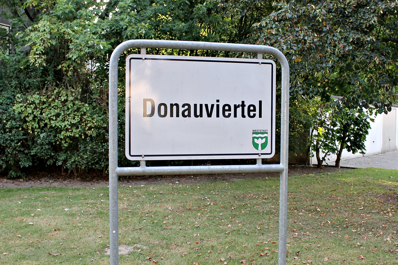 Tafel des Donauviertels in der Braunschweiger Weststadt.